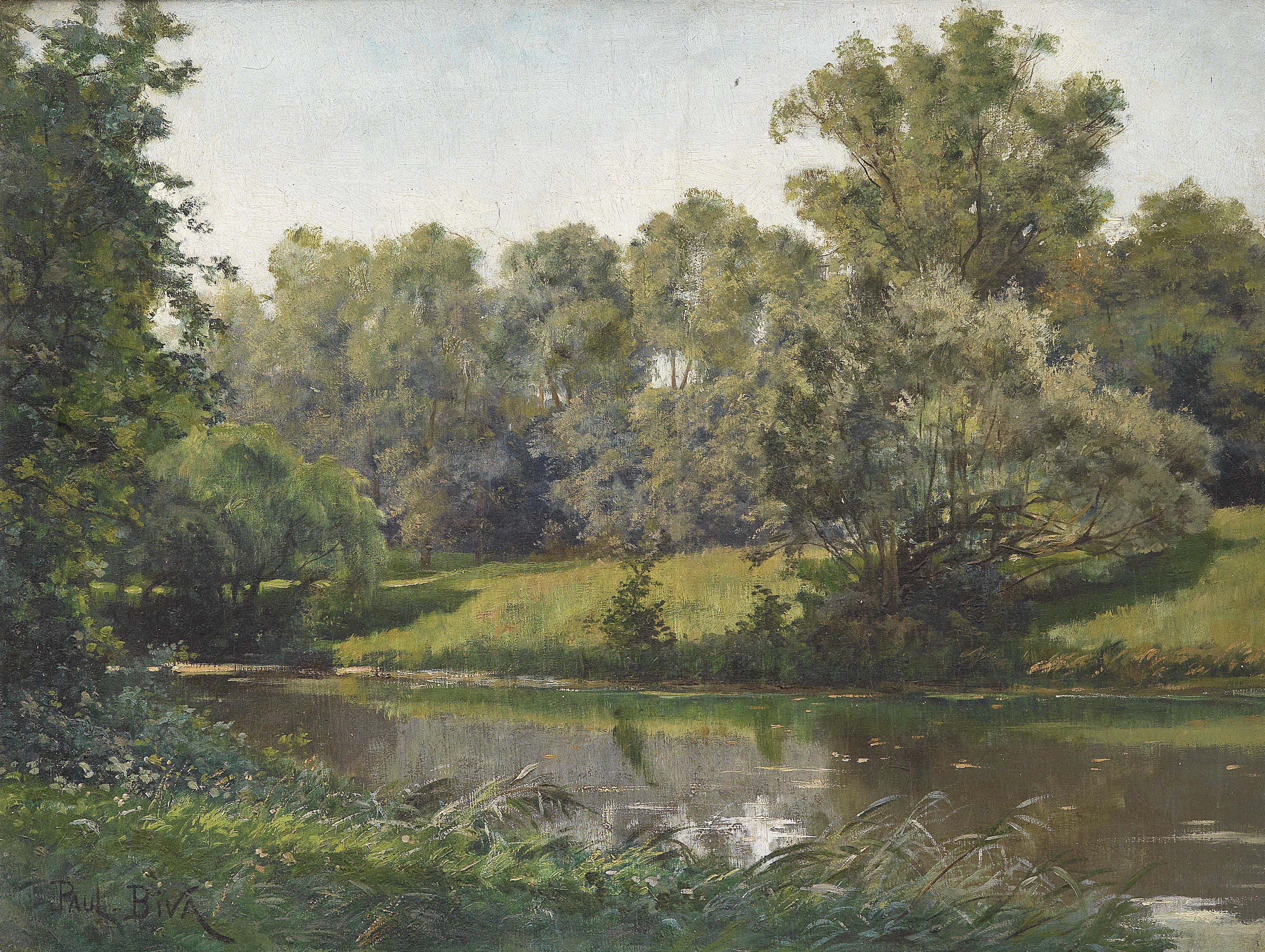 Idyllische Flusslandschaft, signiert Paul Biva, Öl auf Leinwand, 46 x 61 cm